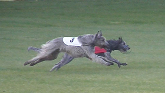 Zwei Irish Wolfhounds beim Coursing